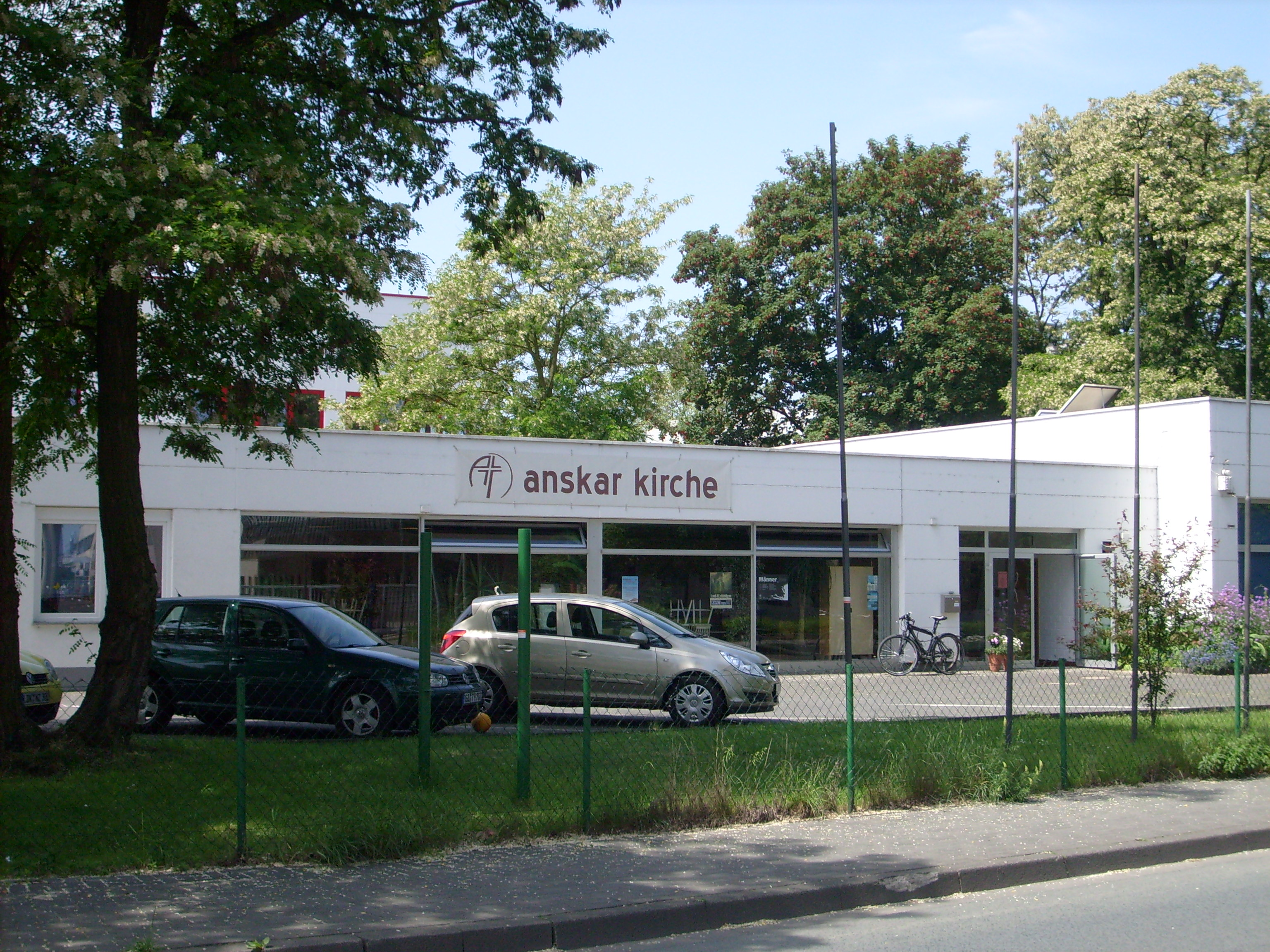 Anskar-Kirche Wetzlar, Philipsstraße 4 35576 Wetzlar-Niedergirmes